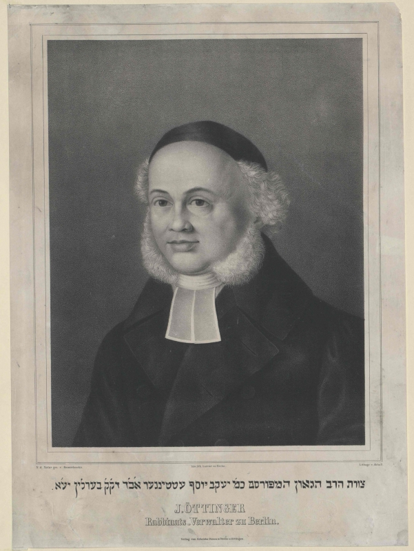 ציור דיוקנו של אטינגר וכתובת לכבודו בעברית ובגרמנית, הופקה לרגל יום הולדתו השישים.